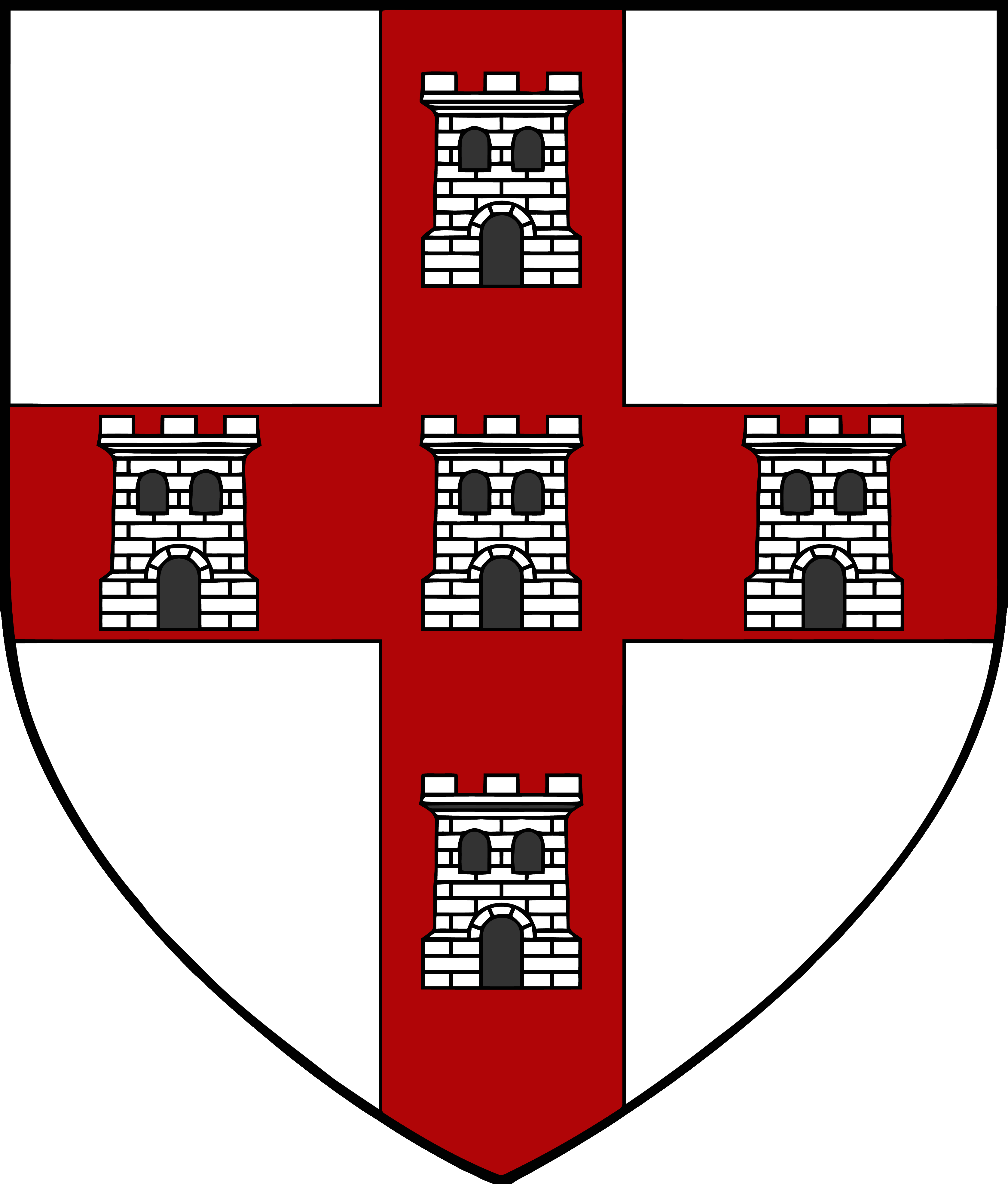 Вуковића грб, рад урађен на основу илирских грбовника